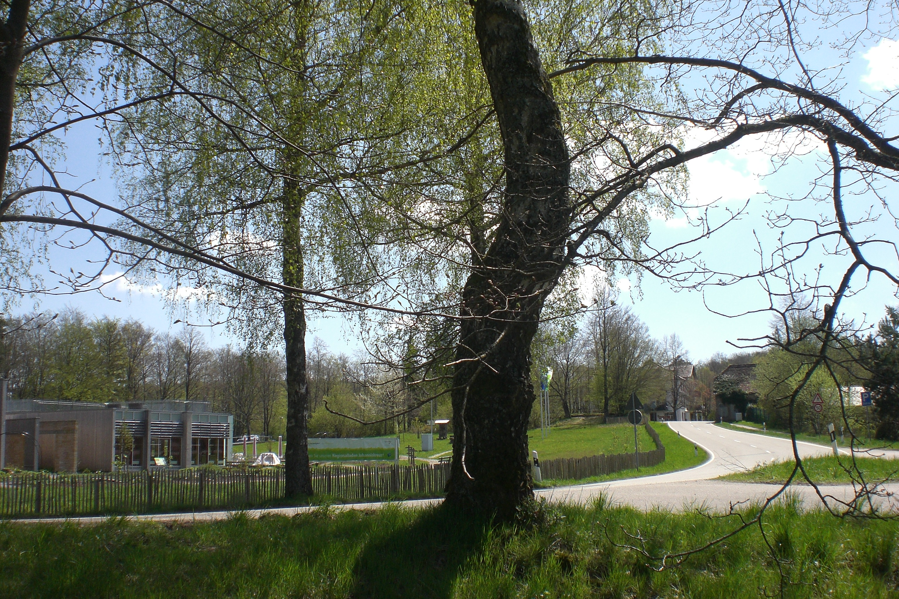 Johanniskreuz an der B48, mit Haus der Nachhaltigkeit